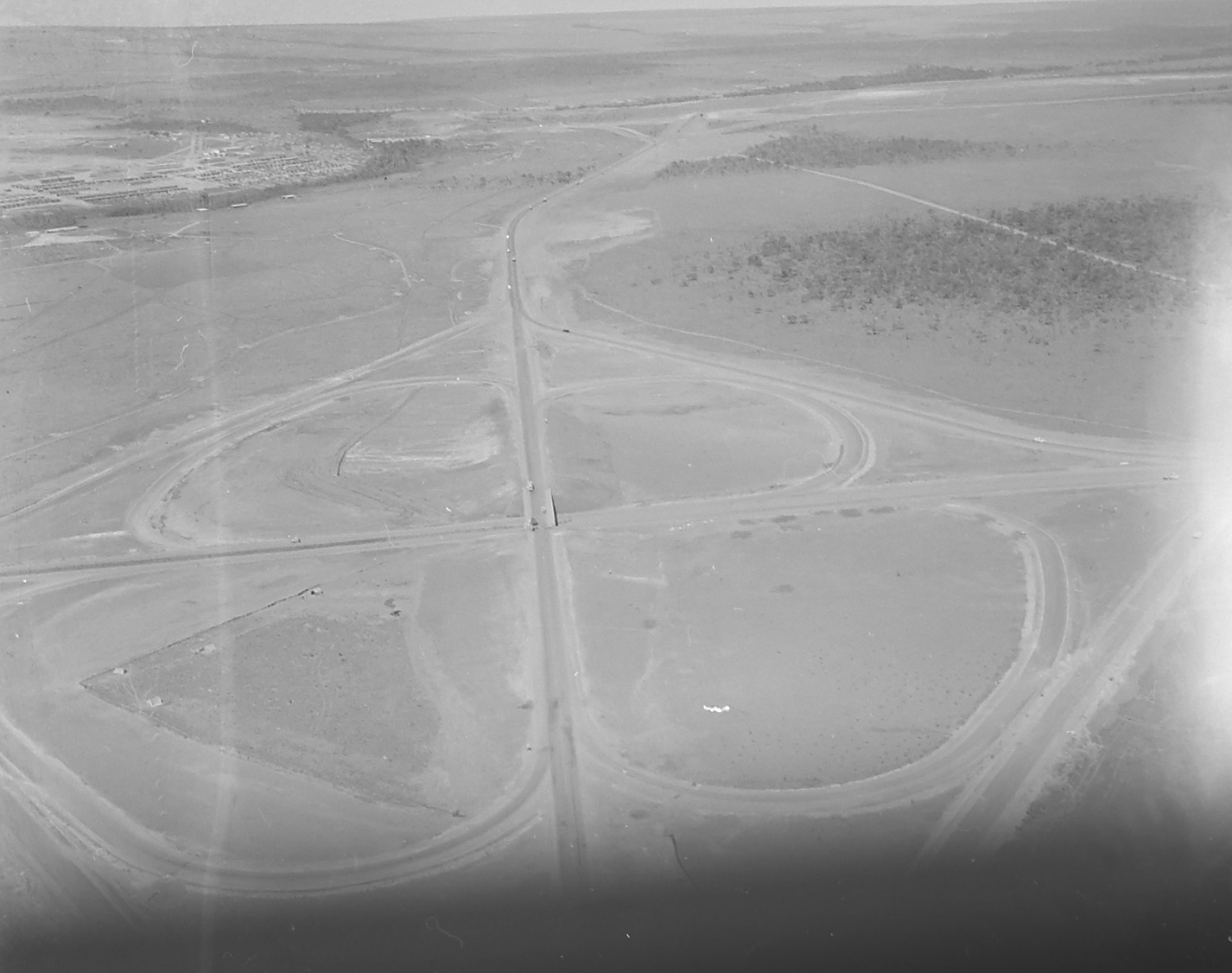 Vistas aéreas da construção de um trevo rodoviário, Brasília